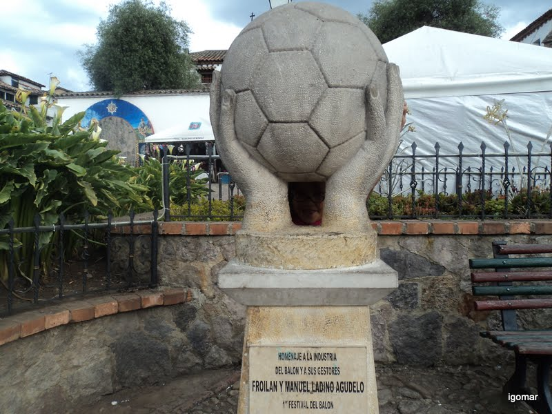 MONGUI PATRIMONIO HISTORICO